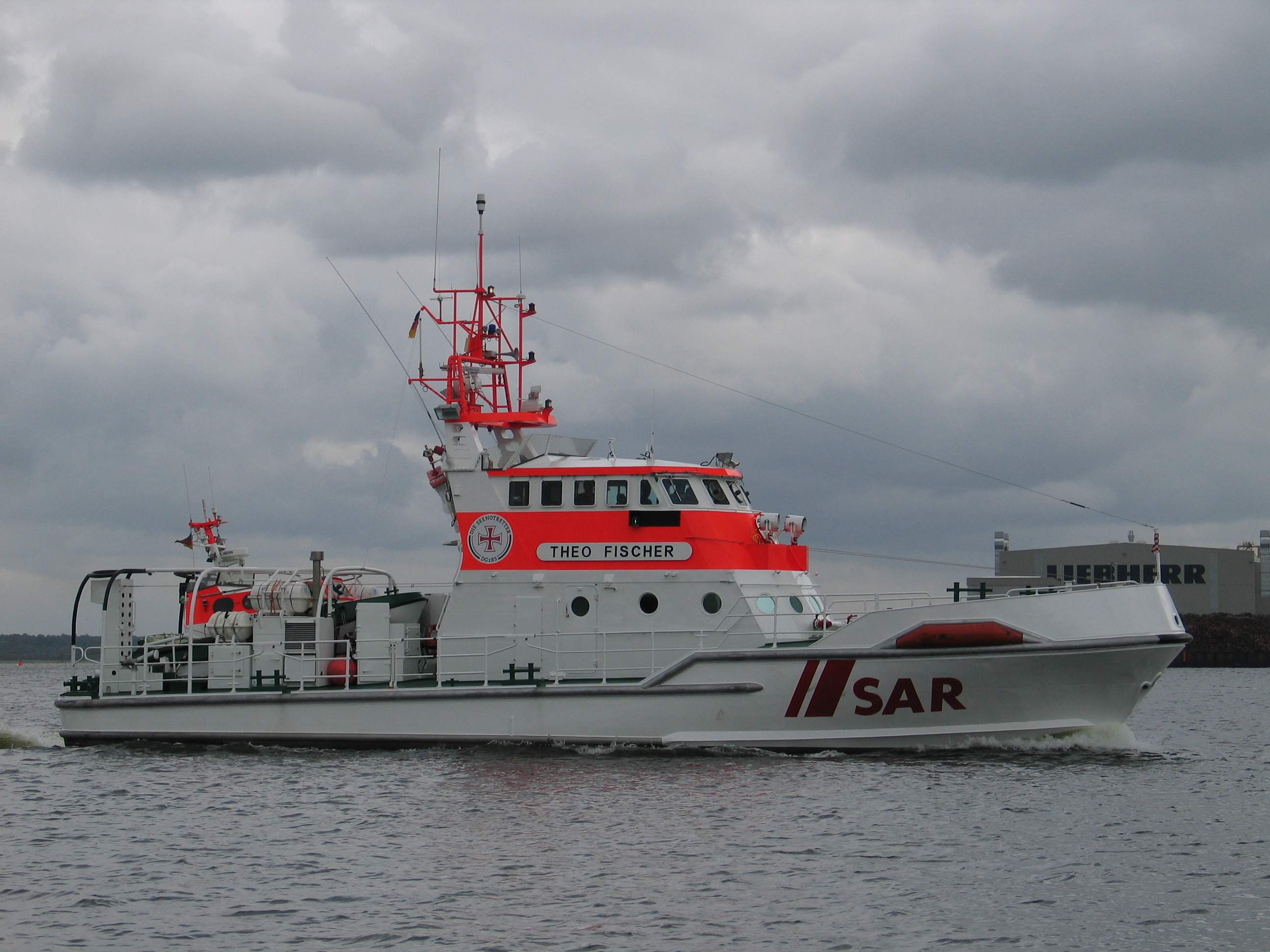 SAR Seenotkreuzer (SK) "Theo Fischer" der Deutschen Gesellschaft zur Rettung Schiffbrüchiger im Hafen zu Rostock.